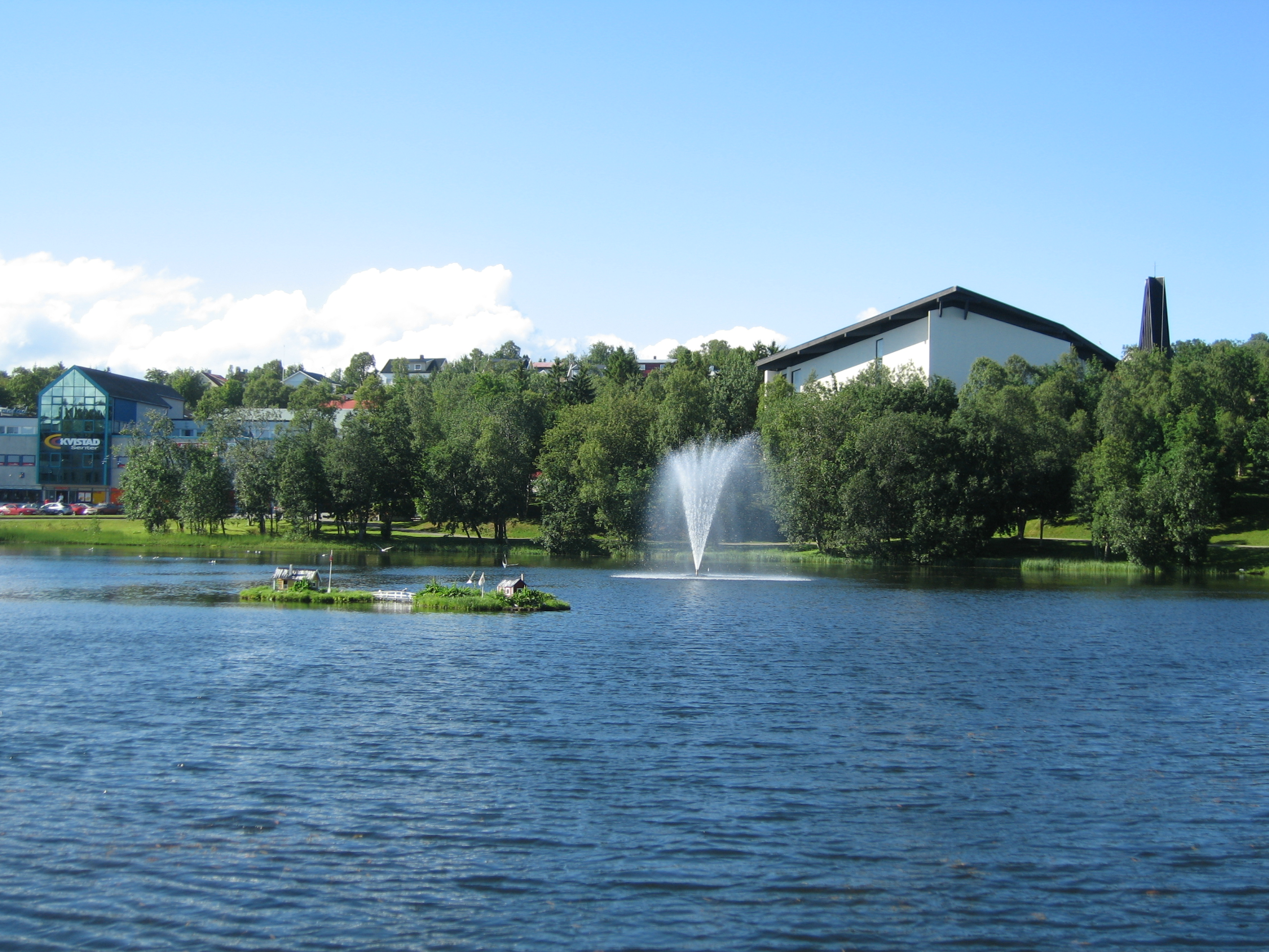 Finnsnesvannet, med Finnsnes kirke og Kvistad Senter